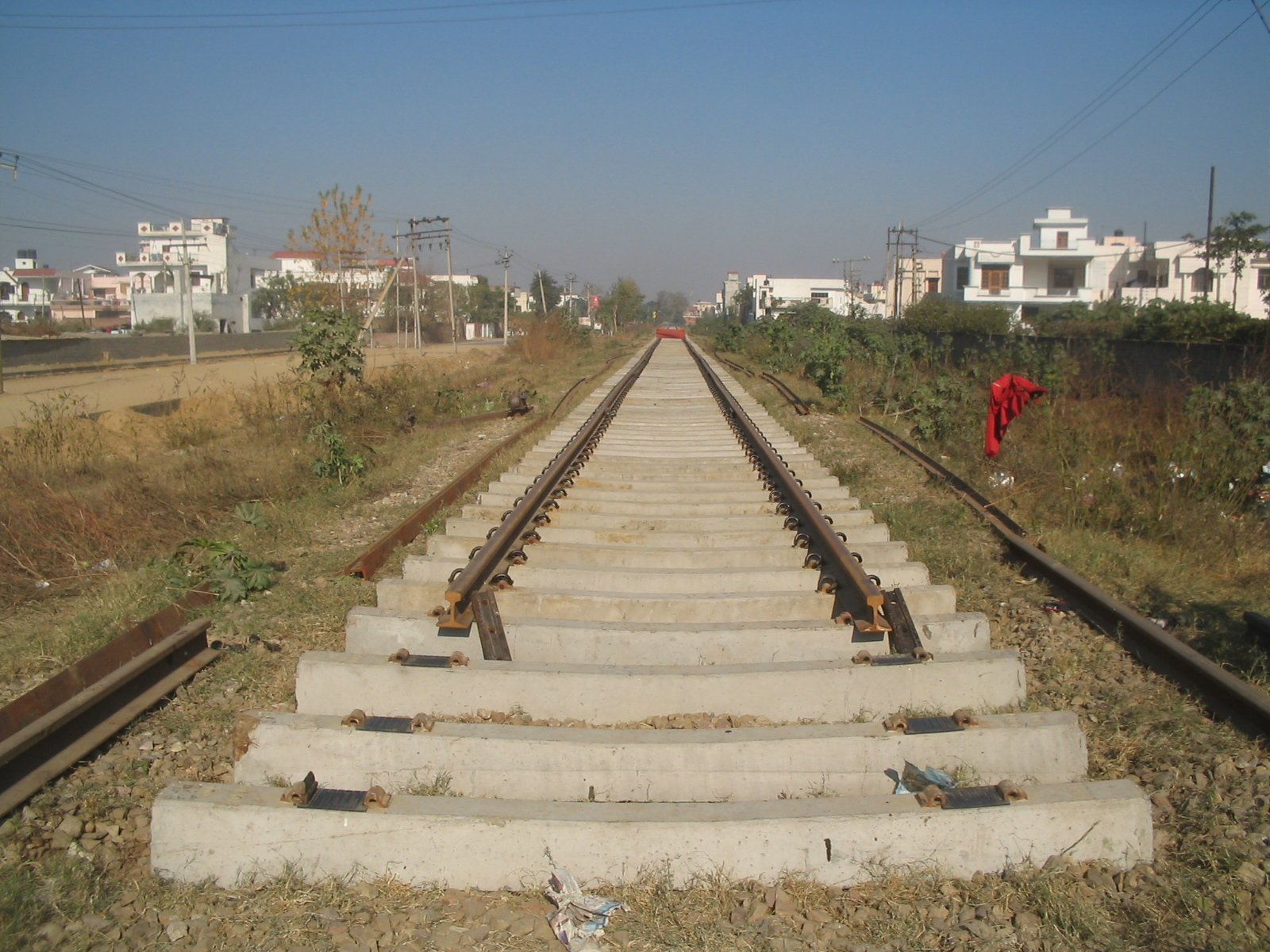 Indian Railways Track Maintenance, Dec 2007, in Jalandhar, Punjab, India